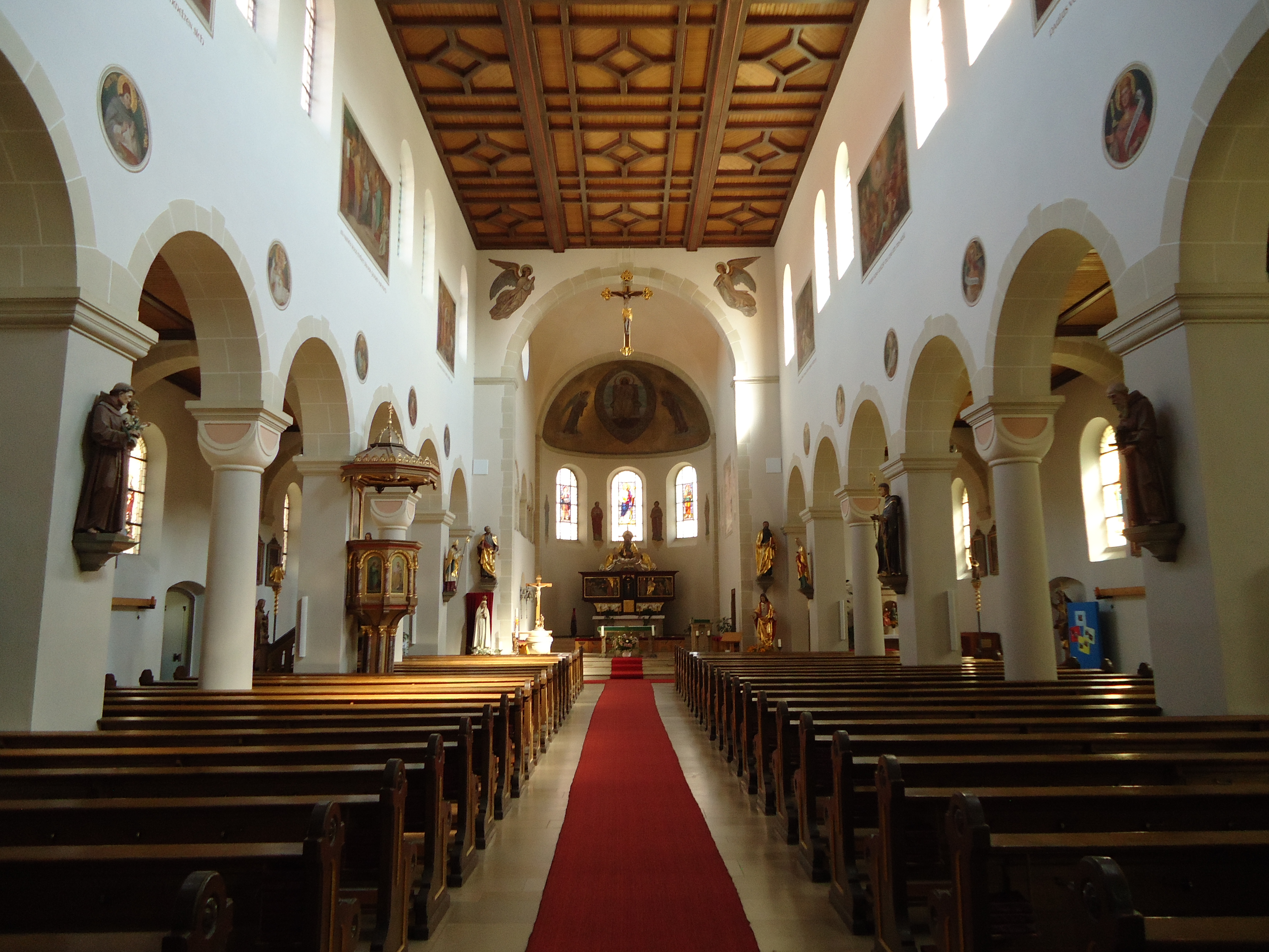 Stadtpfarrkirche St. Jakob Mitterteich - Innenraum